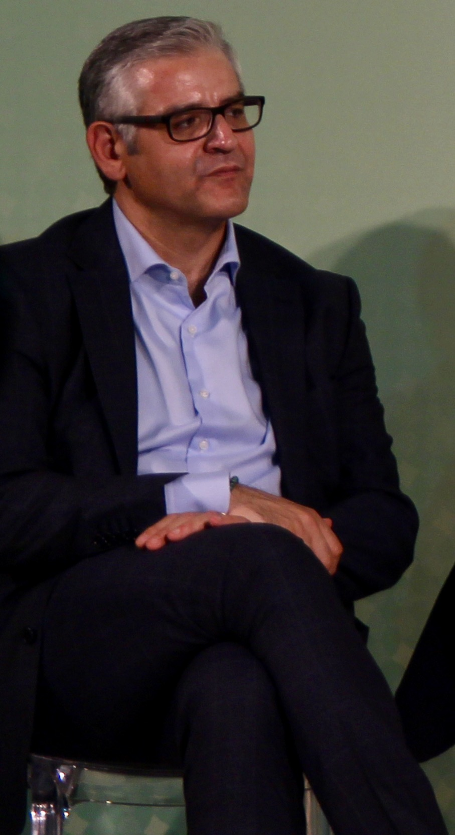 Fortunato Cerlino nel corso di una conferenza stampa al Festival di Venezia 2019